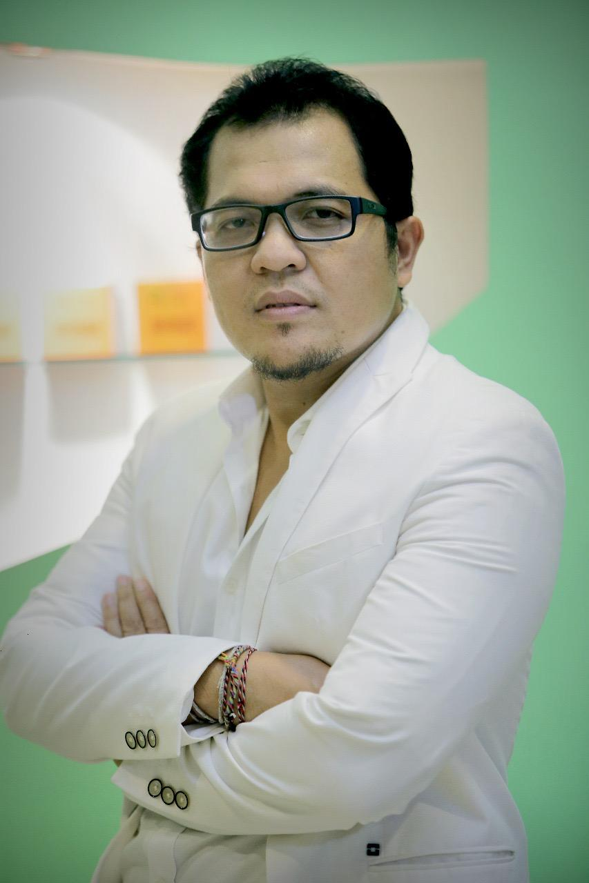 IGN Darmaputra, Ketua HIPMI Bali, pemilik DNI Skin Centre.